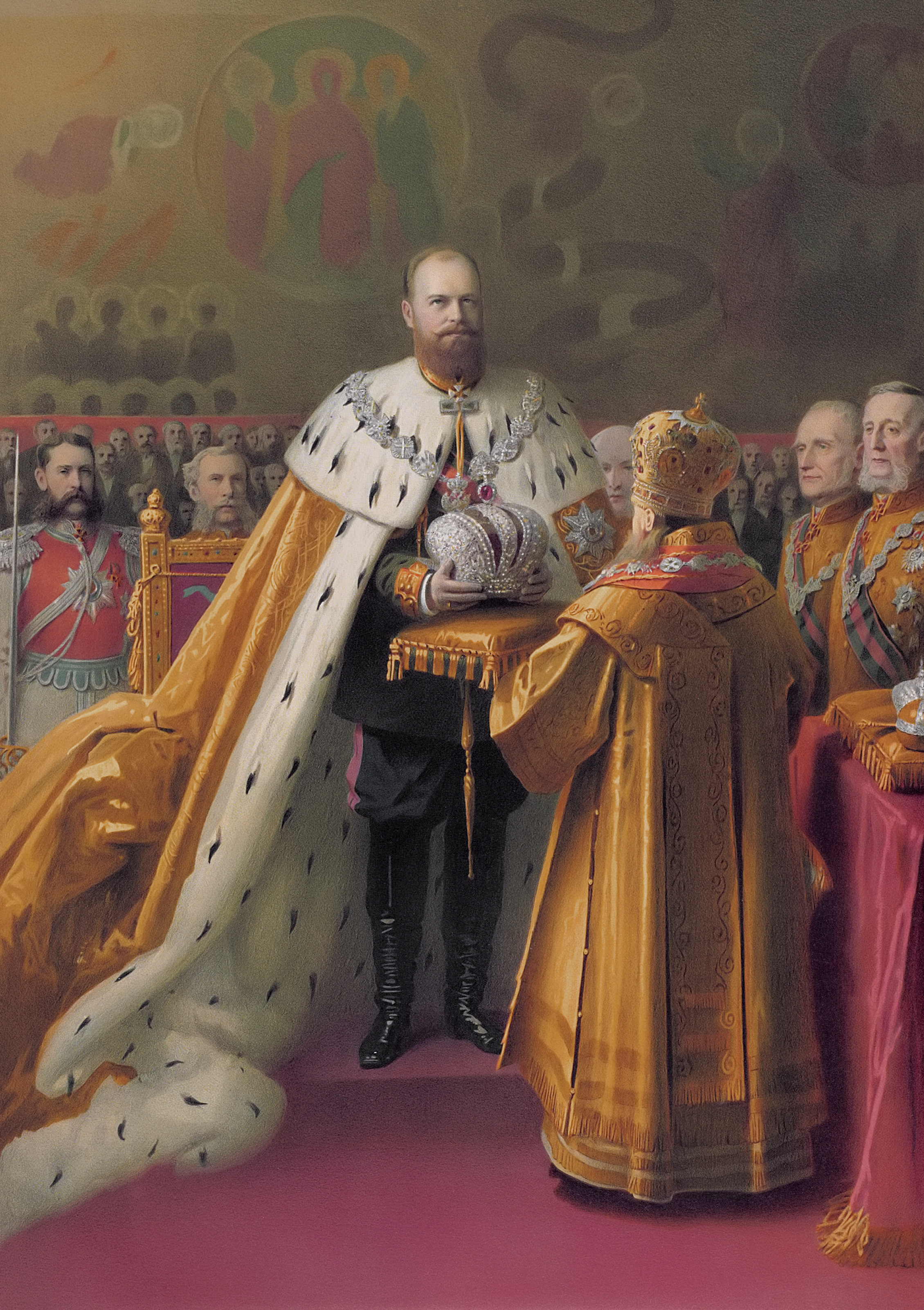 Description du Sacre et du Couronnement de... Alexandre III et l'Imperatrice Marie Féodorovna en l'année 1883.